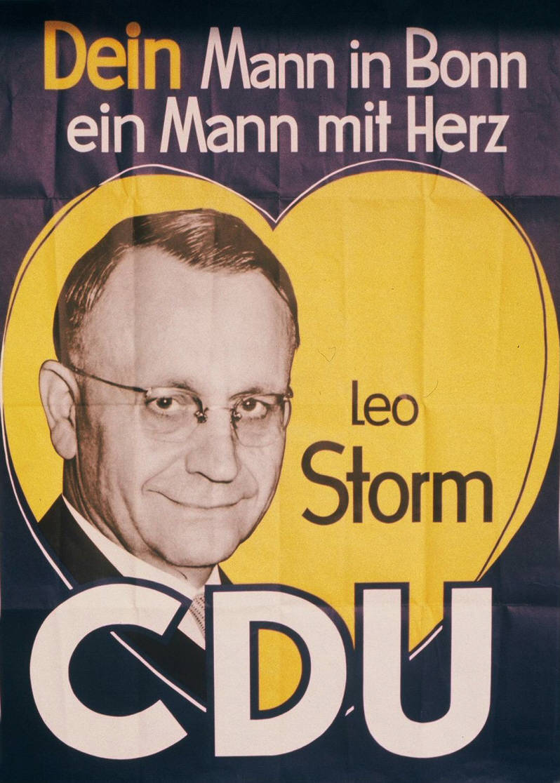 Dein Mann in Bonn ein Mann mit Herz ... Abbildung: Porträtfoto Plakatart: Kandidaten-/Personenplakat mit Porträt Objekt-Signatur: 10-001: 980 Bestand: Plakate zu Bundestagswahlen (10-001) GliederungBestand10-18: Plakate zu Bundestagswahlen (10-001) » Die 4. Bundestagswahl am 17. September 1961 » CDU » Mit Porträtfoto Lizenz: KAS/ACDP 10-001: 980 CC-BY-SA 3.0 DE